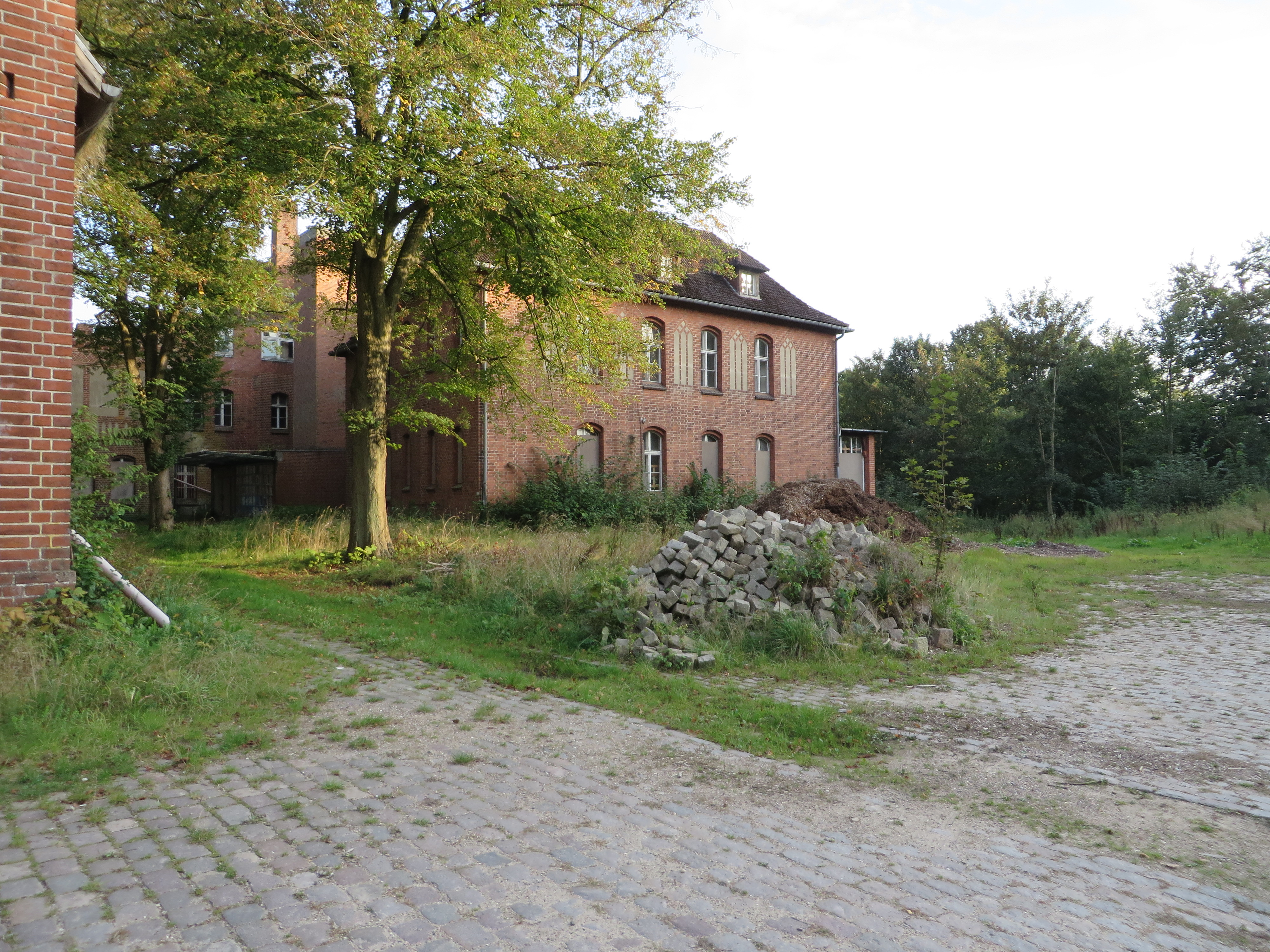 Stelle wo der Vorburg-Schuppen einmal stand (Flensburg-Mürwik), Bild 01